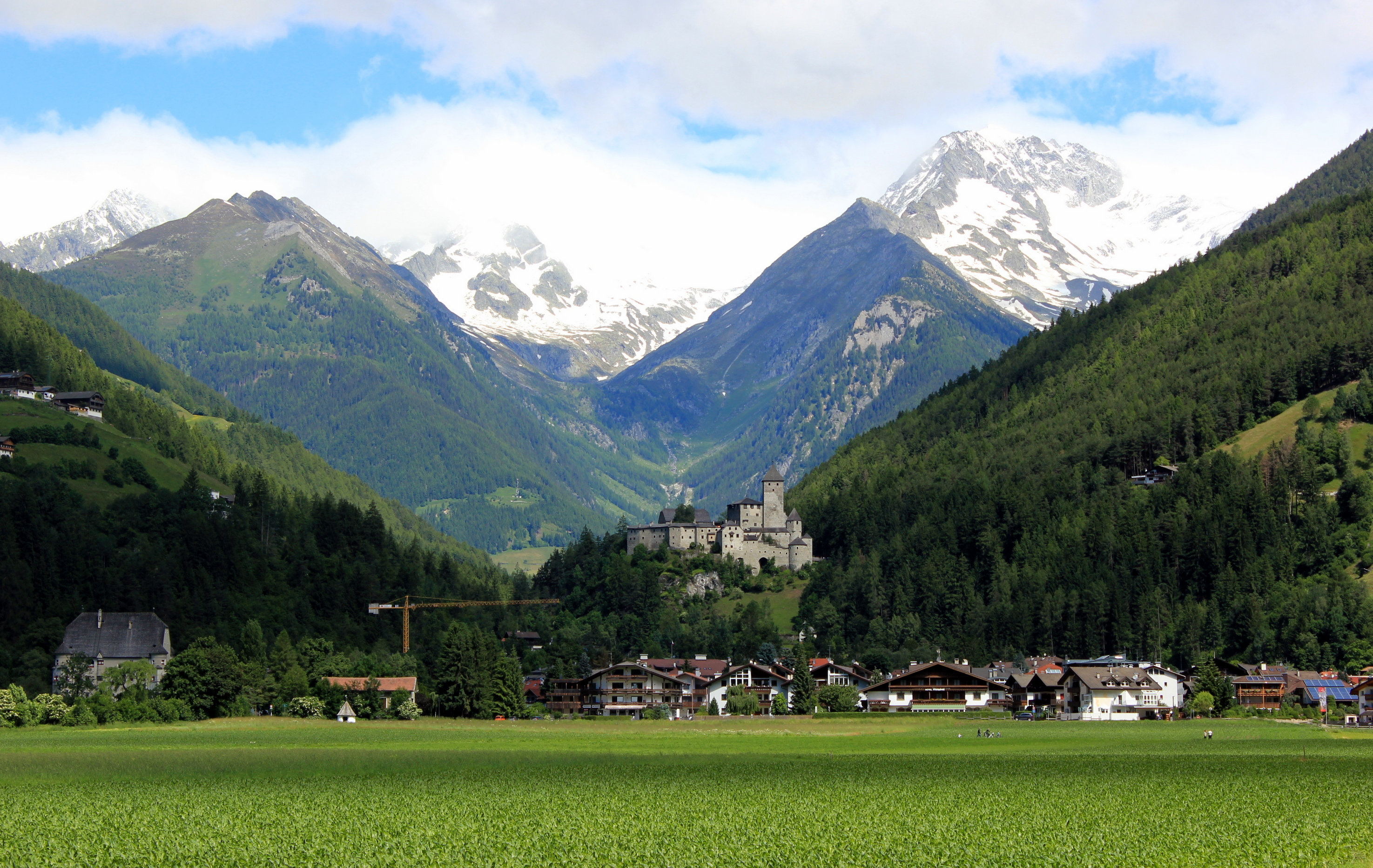 Blick auf Sand in Taufers (Tauferer Ahrntal) aus Südosten.